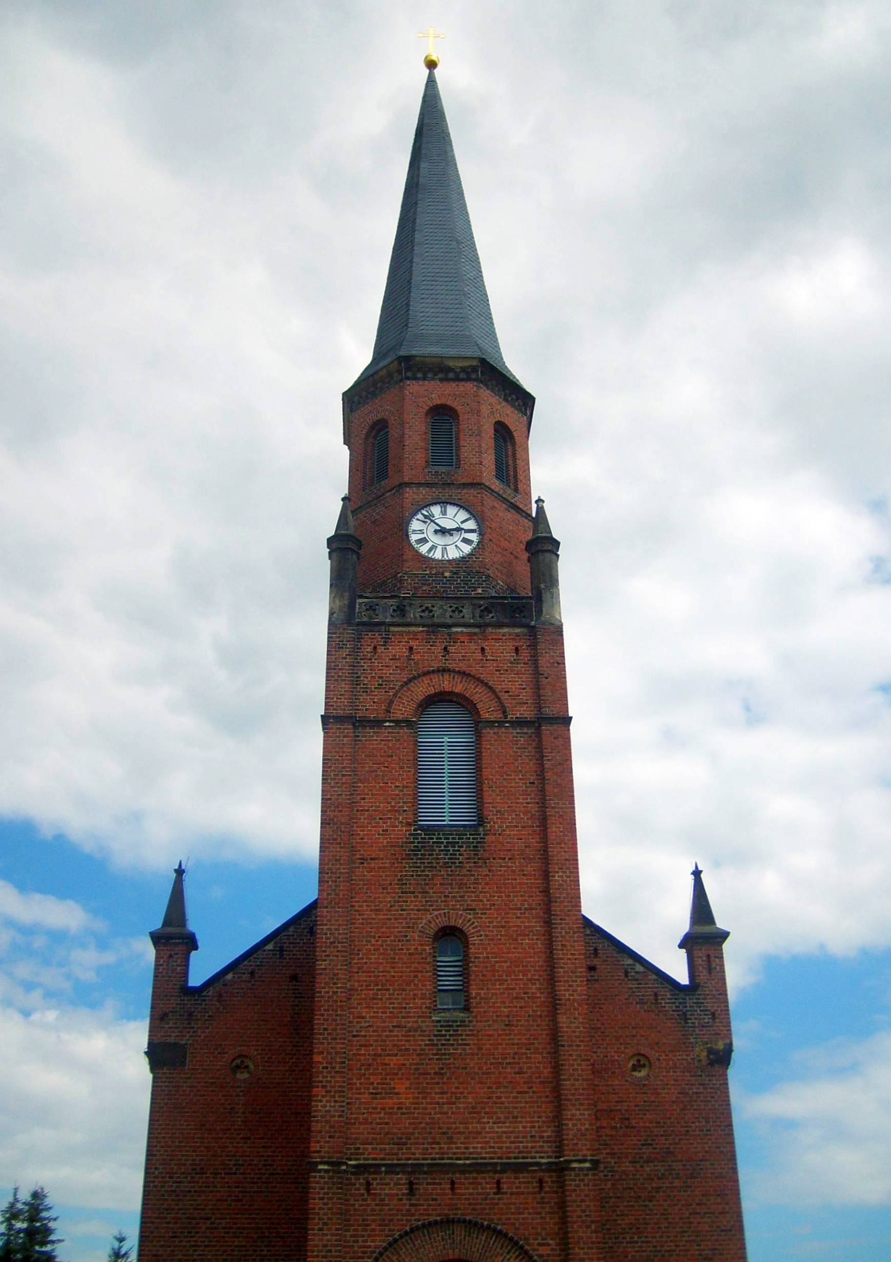 Kirchturm der Dorfkirche Pressel bei Laußig.